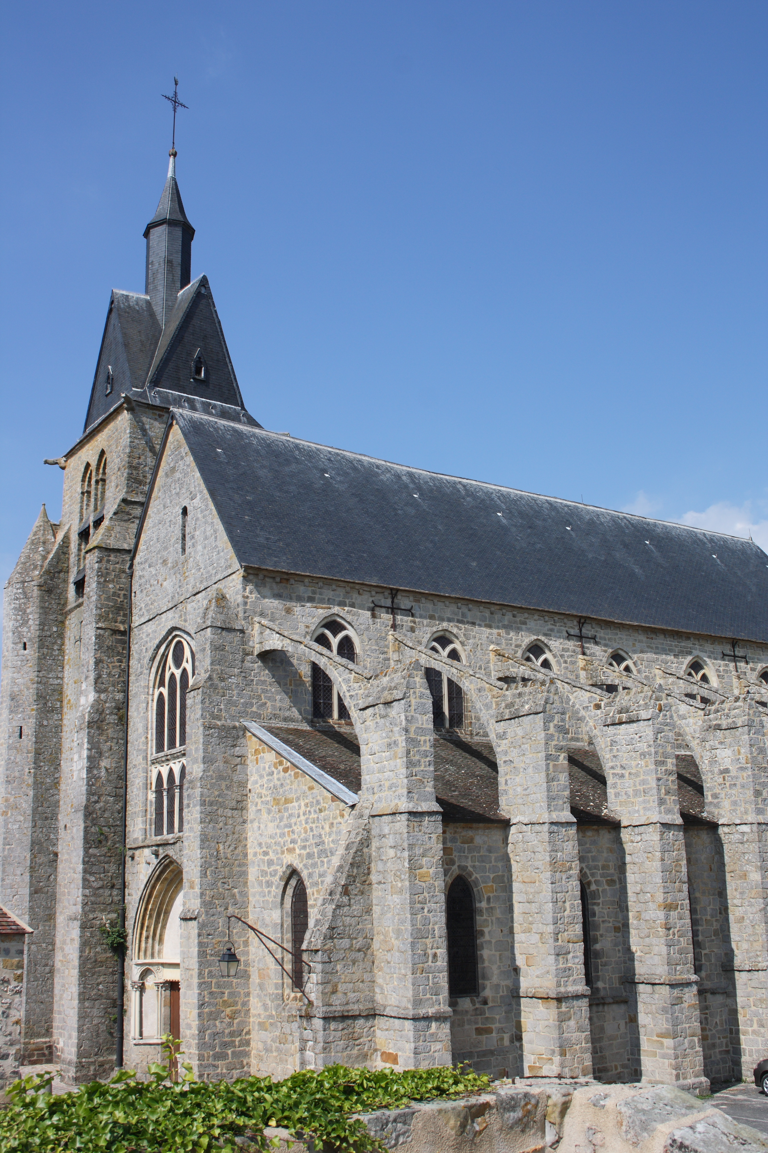 katholische Pfarrkirche Saint-Martin in Nangis